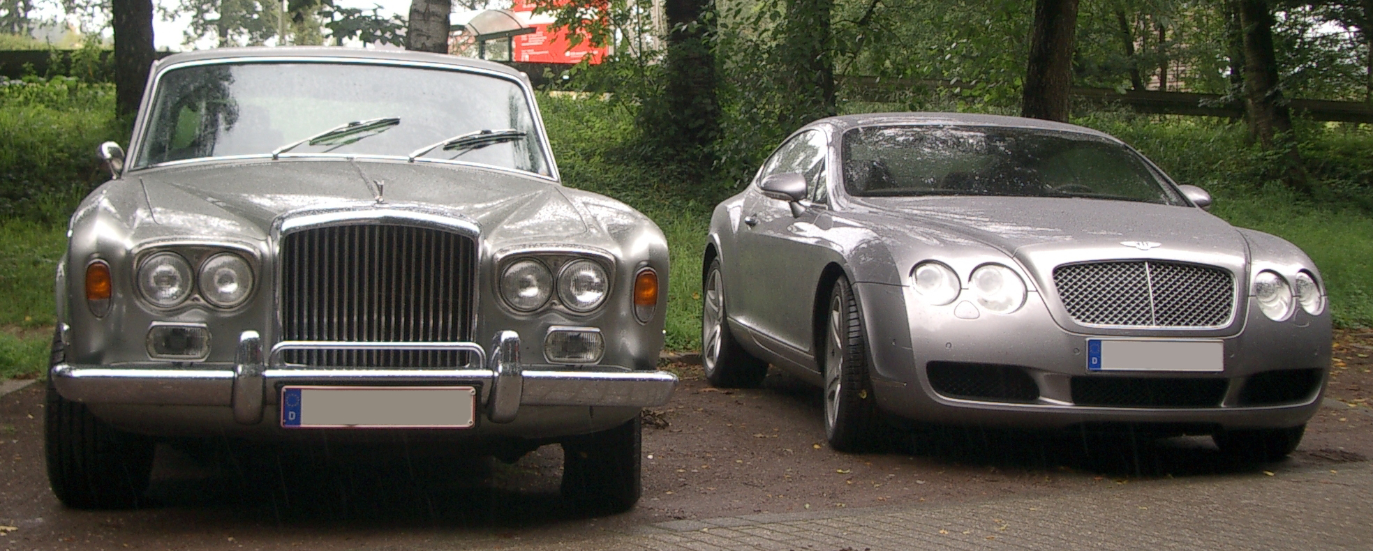 Beschreibung: (Bentley T-Type, Baujahr 1976, neben Bentley Continental GT, Baujahr 2005) Quelle: (selbst fotografiert) Fotograf oder Zeichner: (Brit Driver) Datum: (7.8.2005) Andere Versionen